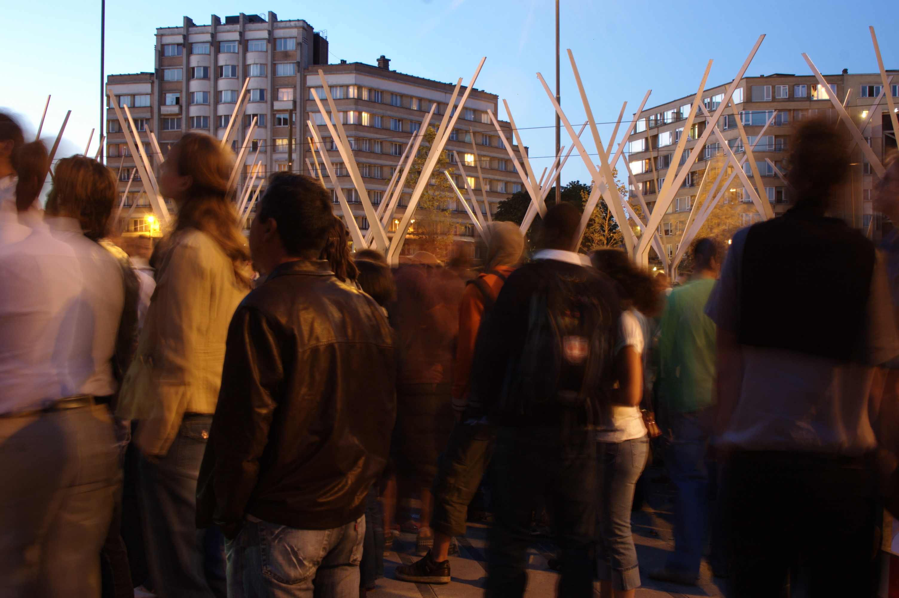 Spectateurs de football place Eugène Flagey, à Bruxelles